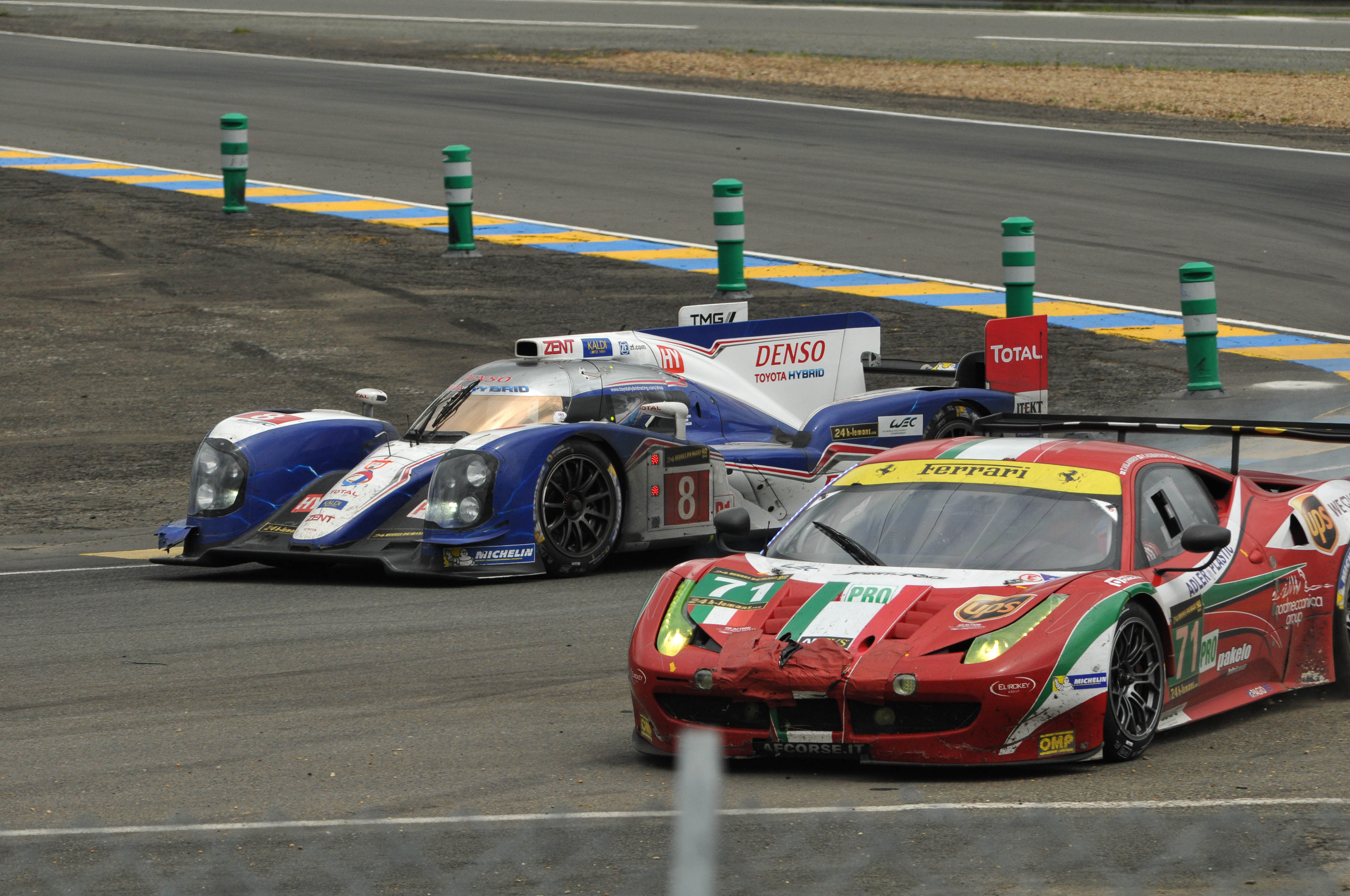 Le Mans 2013